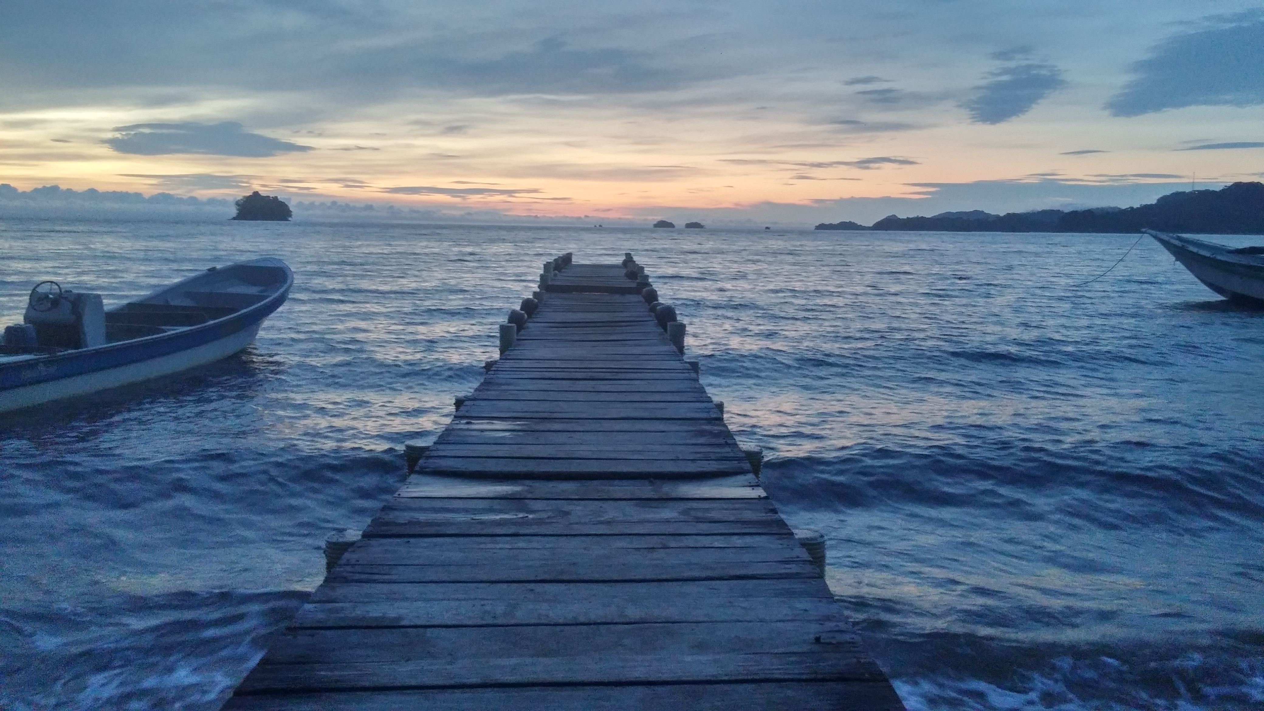 Esta fotografía fue tomada en el municipio colombiano con código 27006.